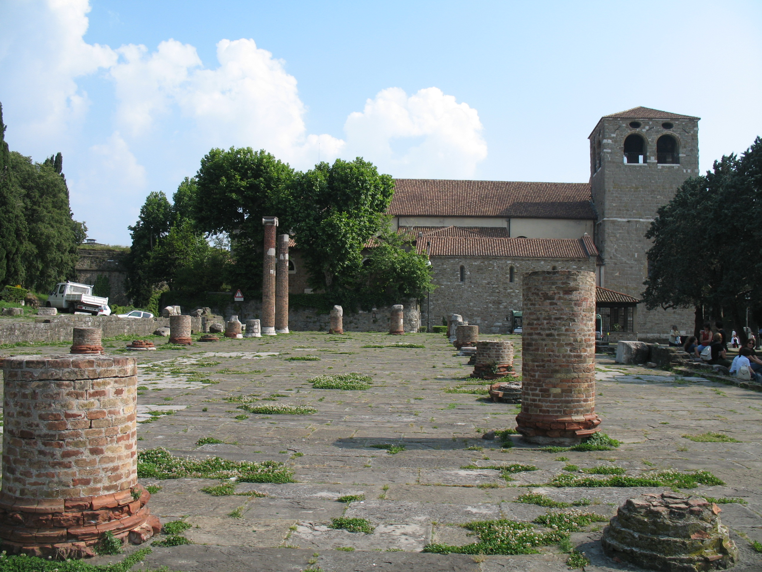 Immagine da Trieste. Cattedrale di San Giusto